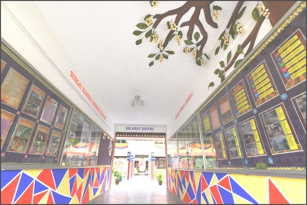 ed